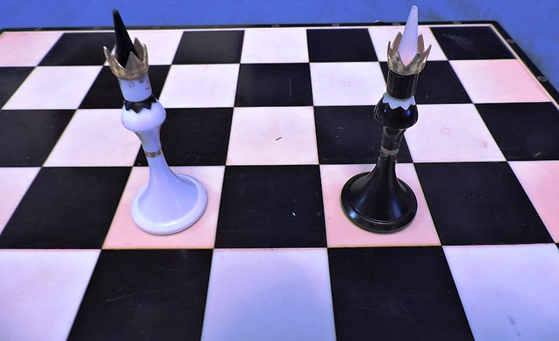 Между двумя шахматными королями всегда остаётся одна клетка